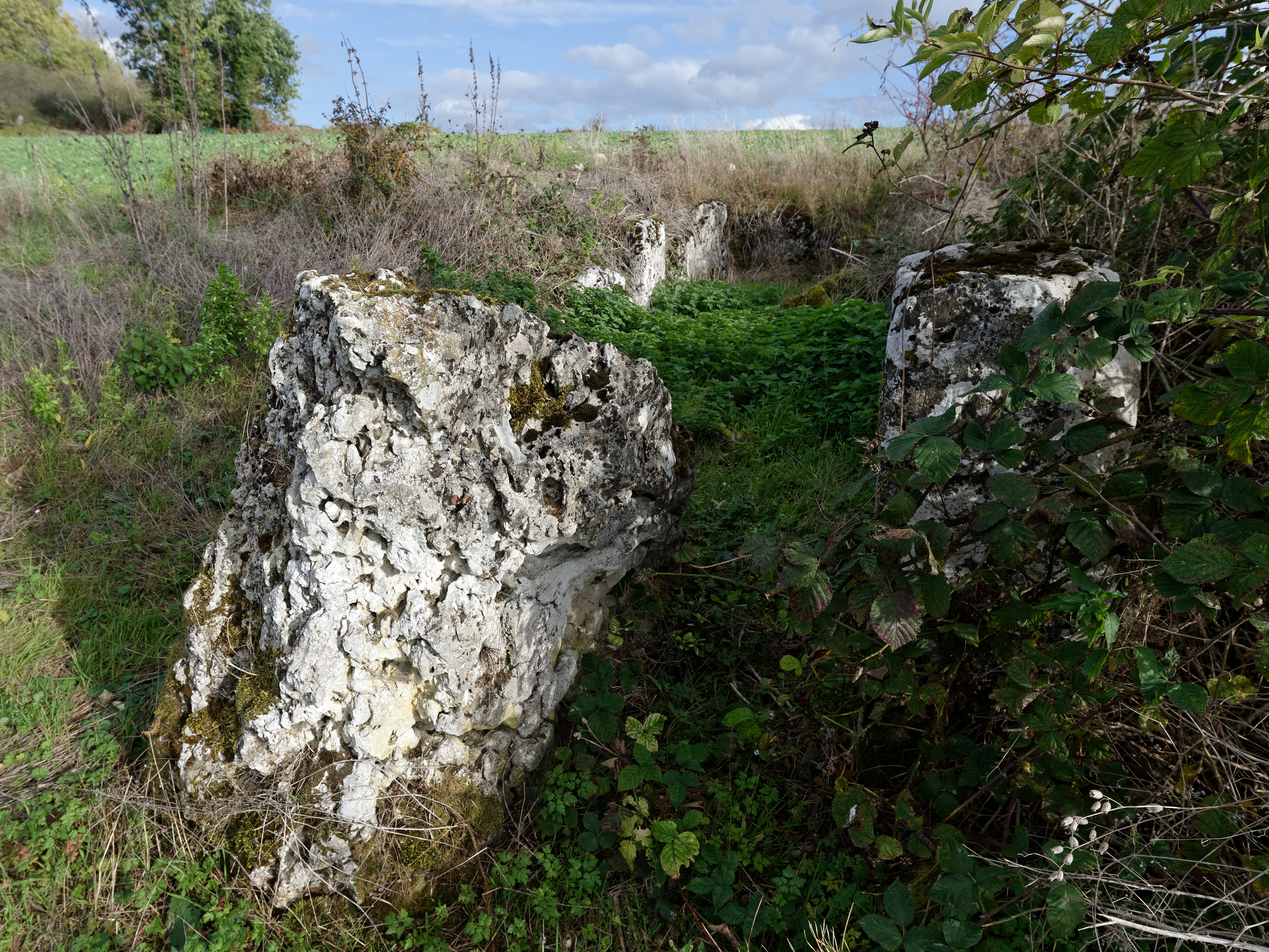 Allée couverte de Copierres (dite aussi dolmen de la Vieille Côte) à Montreuil-sur-Epte, dans le Val-d'Oise.